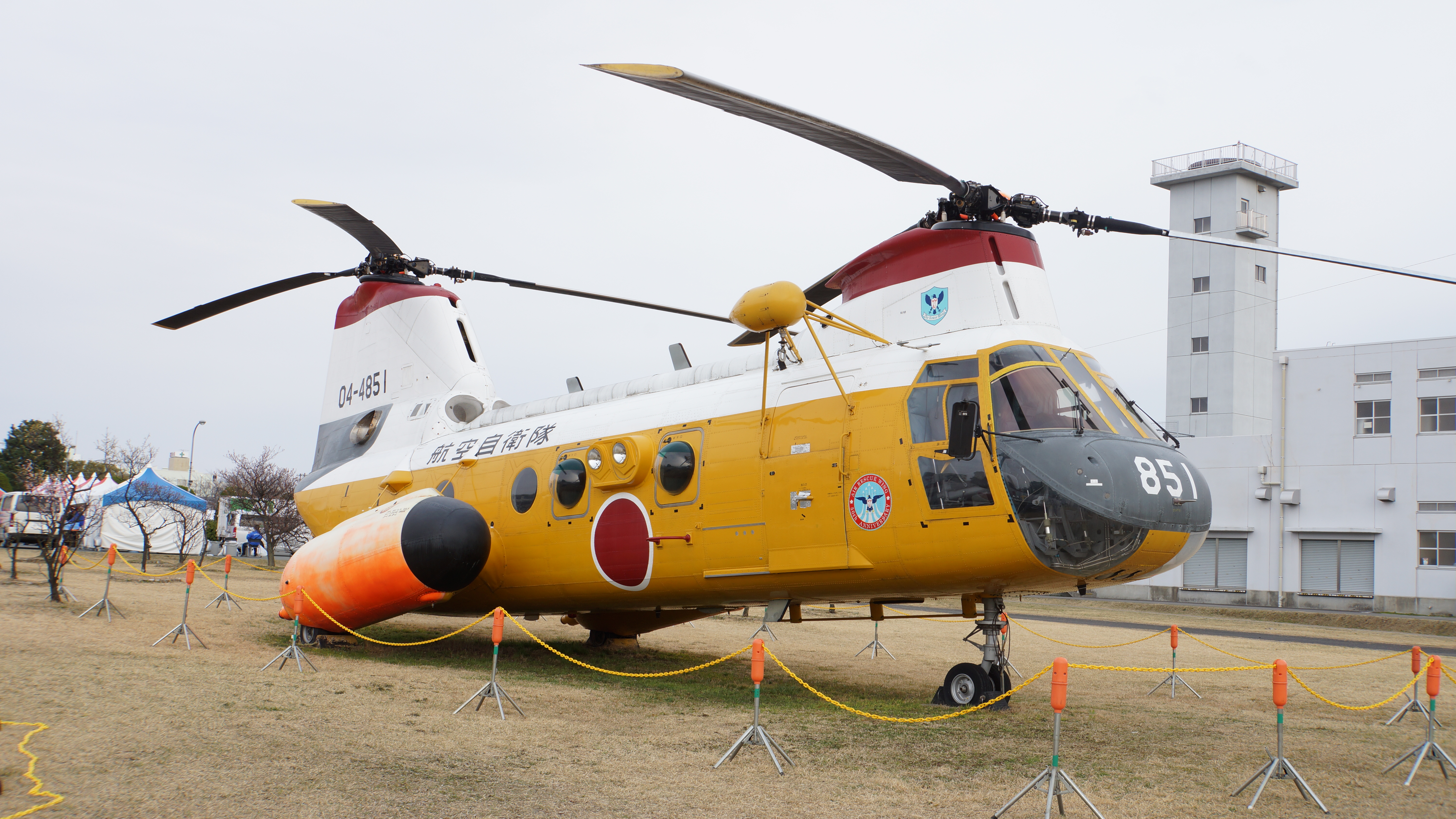 航空自衛隊 KV-107ⅡA-5救難ヘリコプター（04-4851号機） 右前面。2016年3月13日 小牧基地にて。